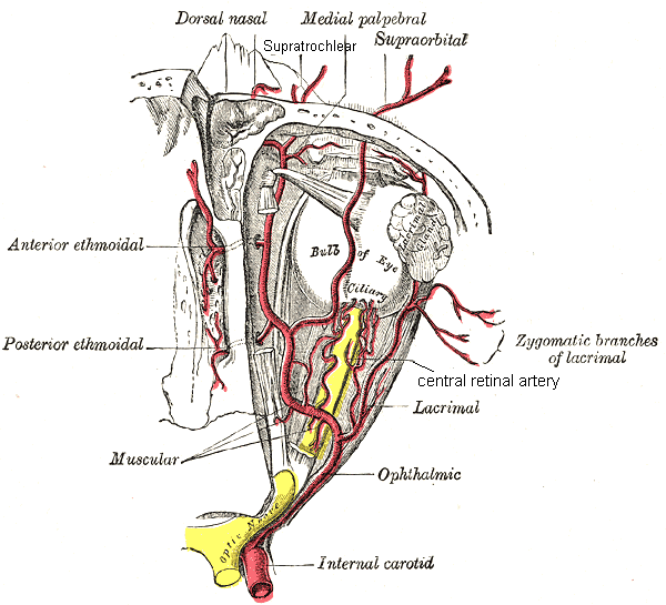 Vascularización de la zona oftálmica